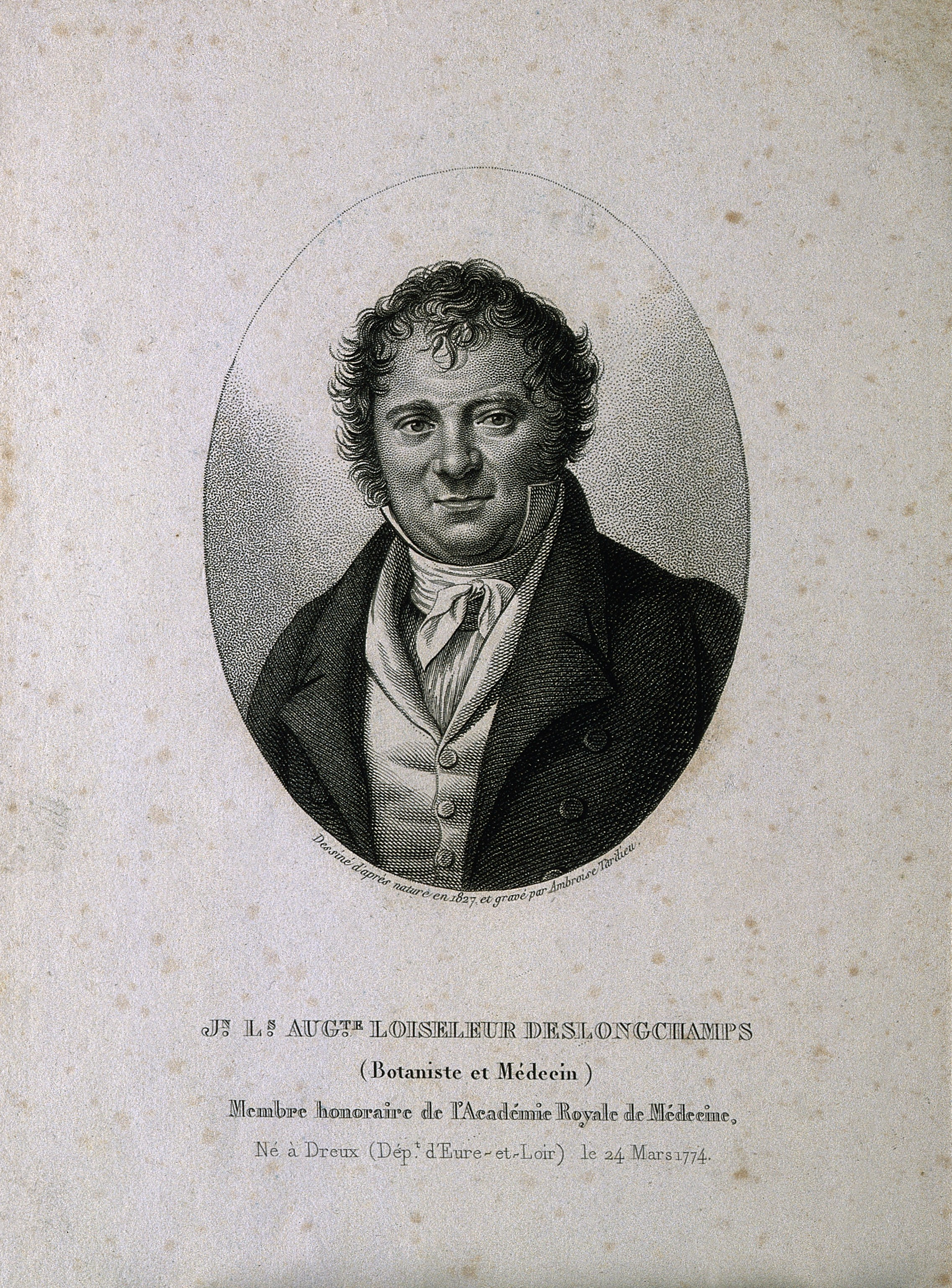 Jean Louis Auguste Loiseleur Deslongchamps. Stipple engraving by A. Tardieu, 1827, after himself. Iconographic Collections Keywords: portrait prints; Ambroise Tardieu; stipple prints; Jean-Louis-Auguste Loiseleur-Deslongchamps